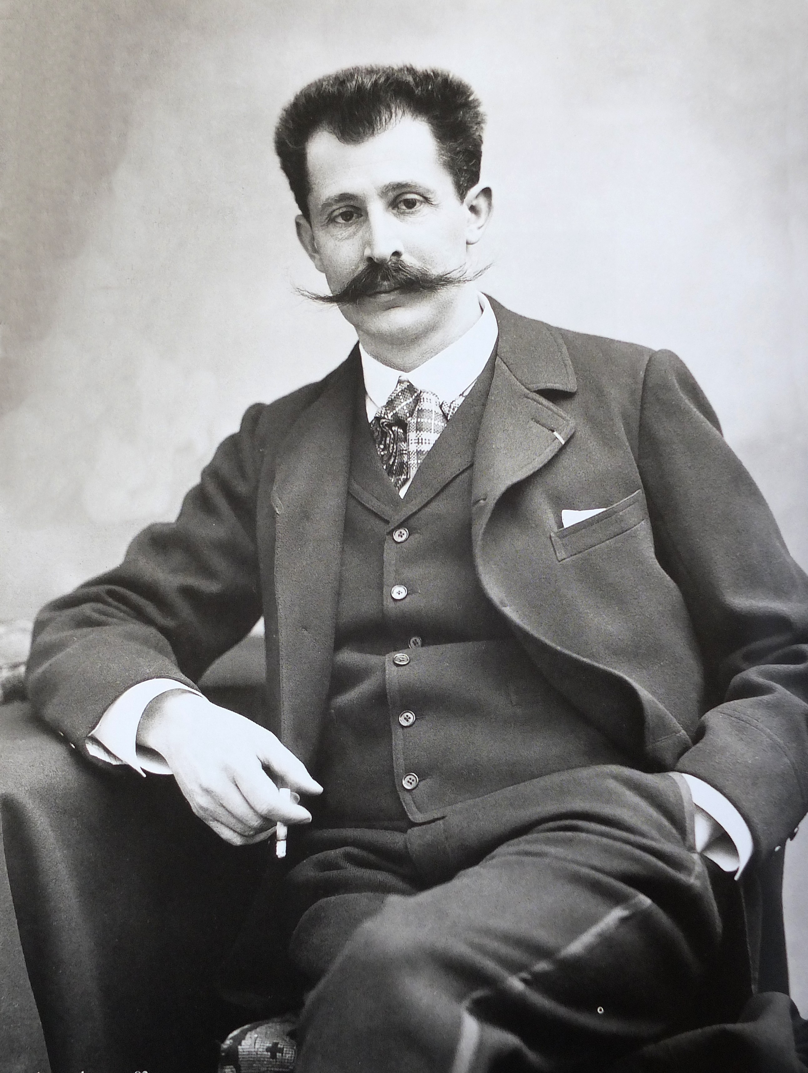 Georges de Porto-Riche, photographié par Paul Nadar le 24 décembre 1895.